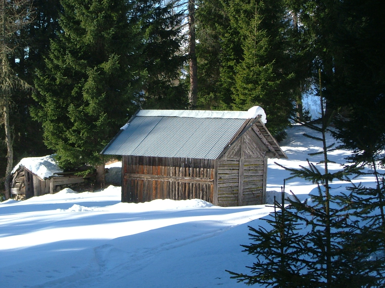 Fienile (tabià), passo di Monte Zovo, Comelico Superiore, Belluno, Veneto, Dolomites, Italy